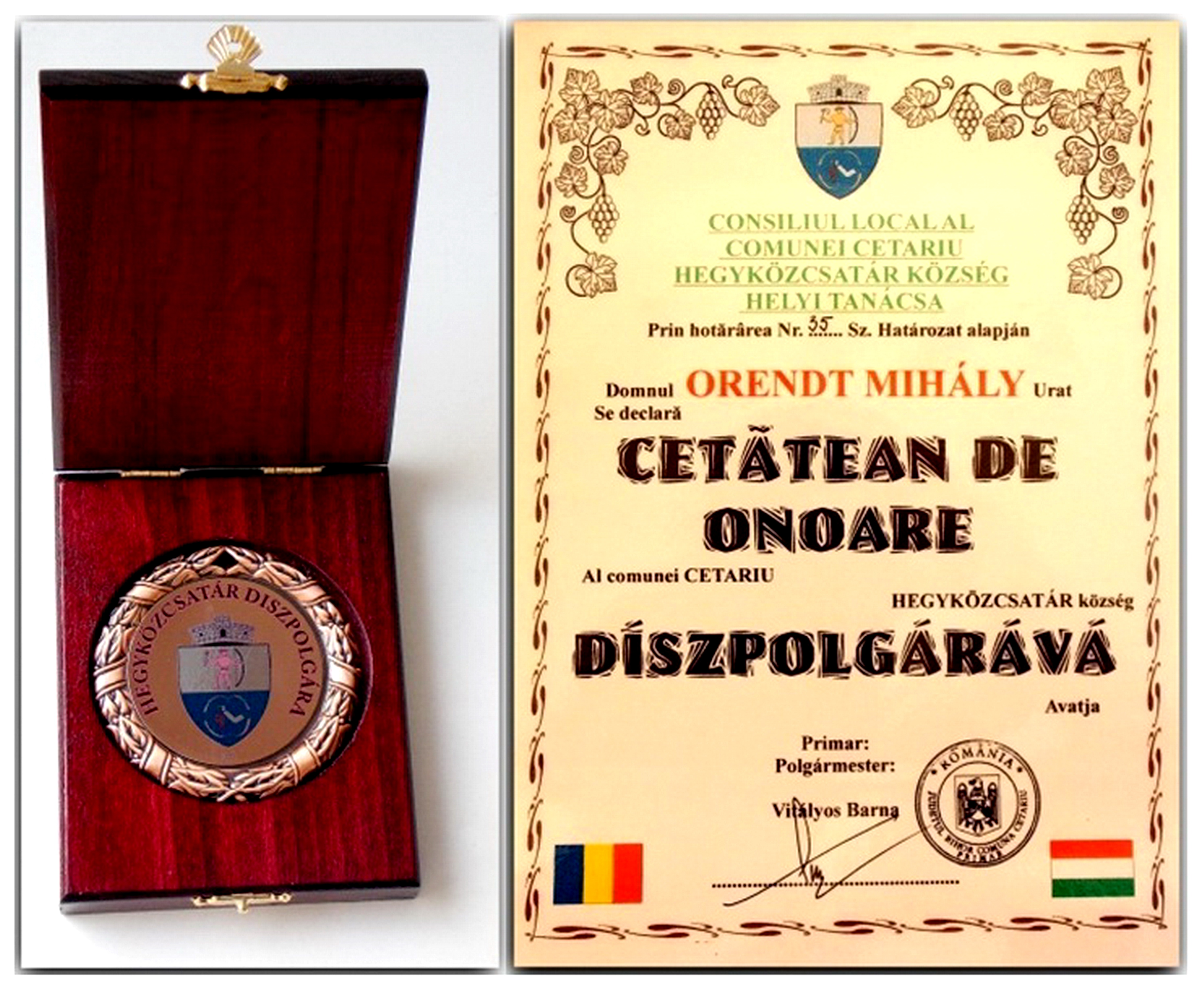 Díszpolgári cím